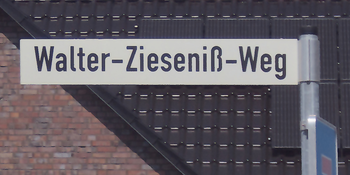 Nach dem früherem Bürgermeister von Barsinghausen wurde eine Straße in einem Neubaugebiet benannt.